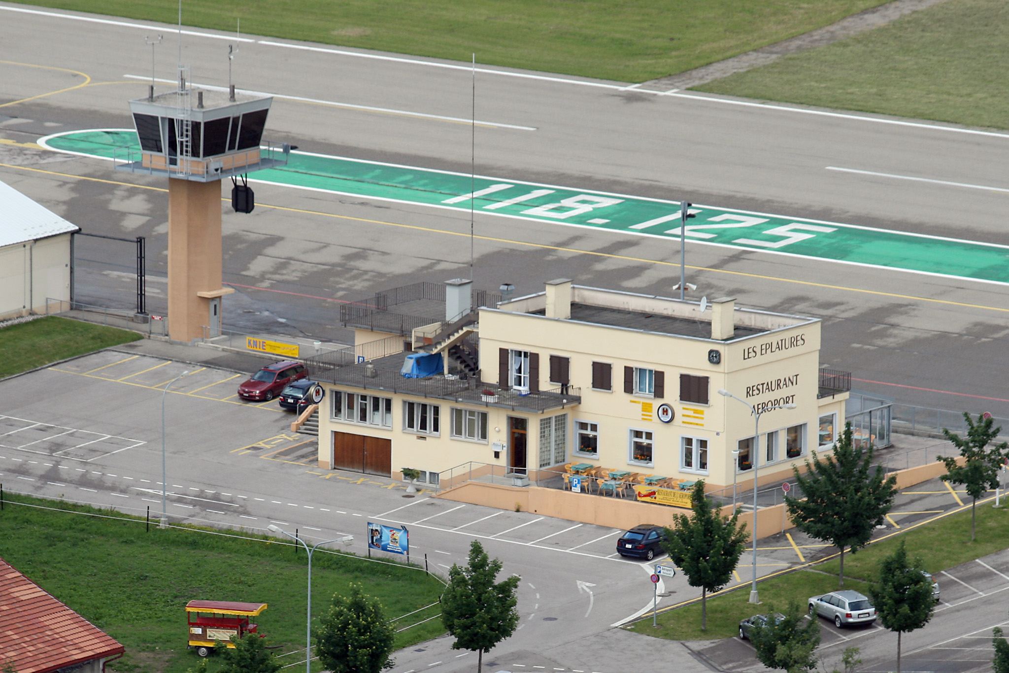 Airport Les Eplatures, La Chaux-de-Fond, Switzerland